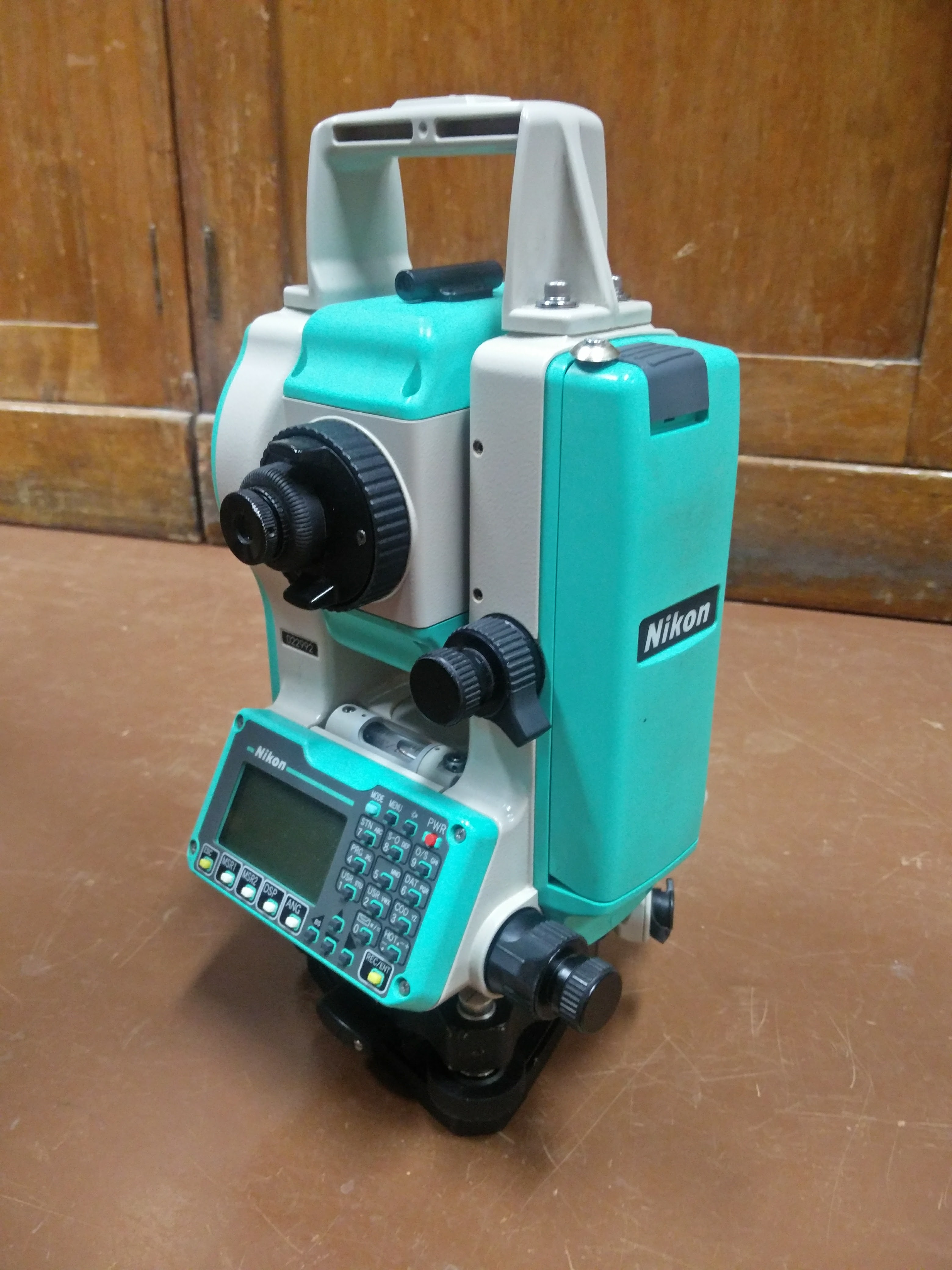 tahhümeeter Nikon DTM-332 Eesti Maaülikoolis